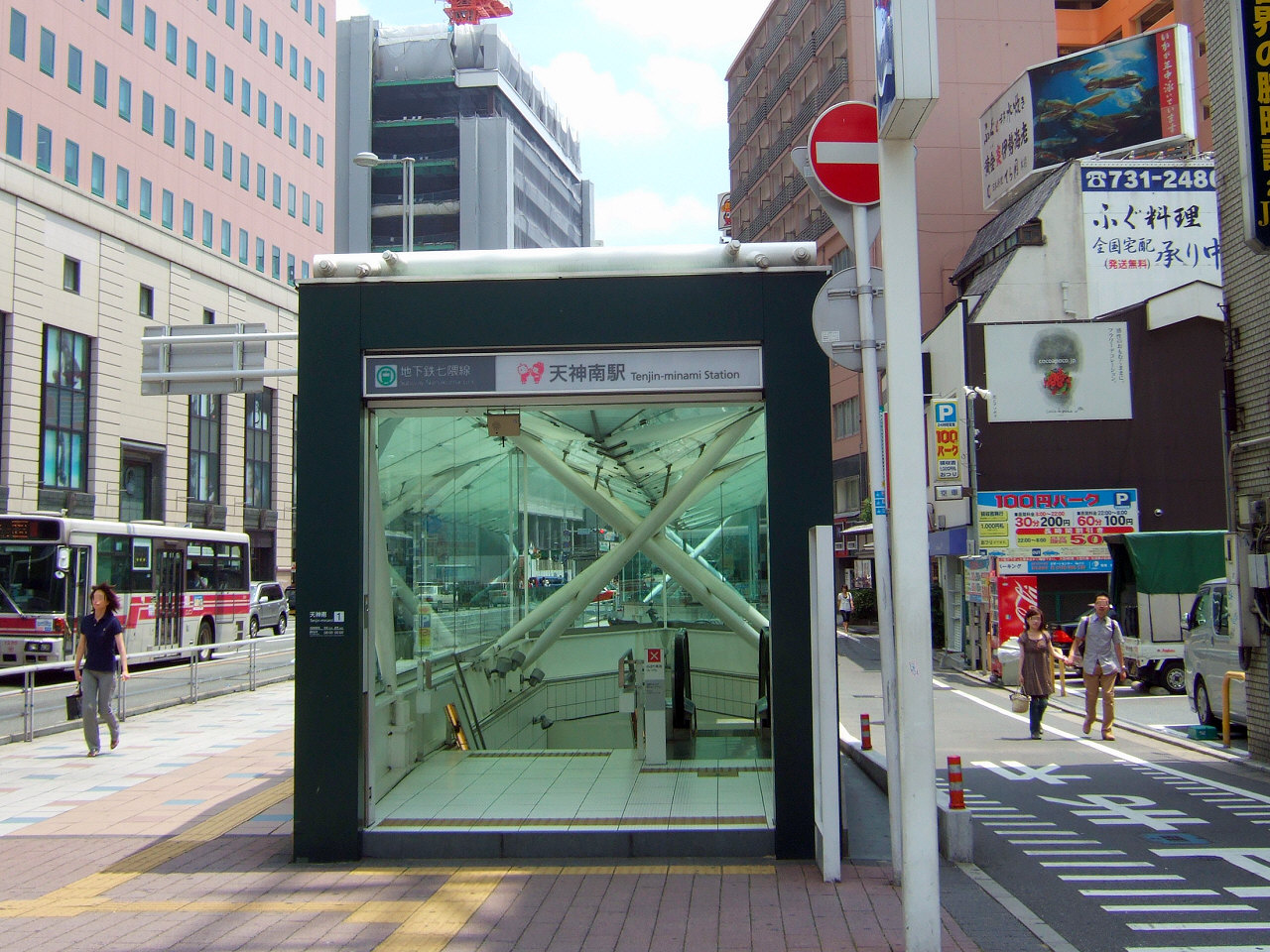 福岡市地下鉄天神南駅1番出入口（Tenjinminami Station,Fukuoka City Subway）